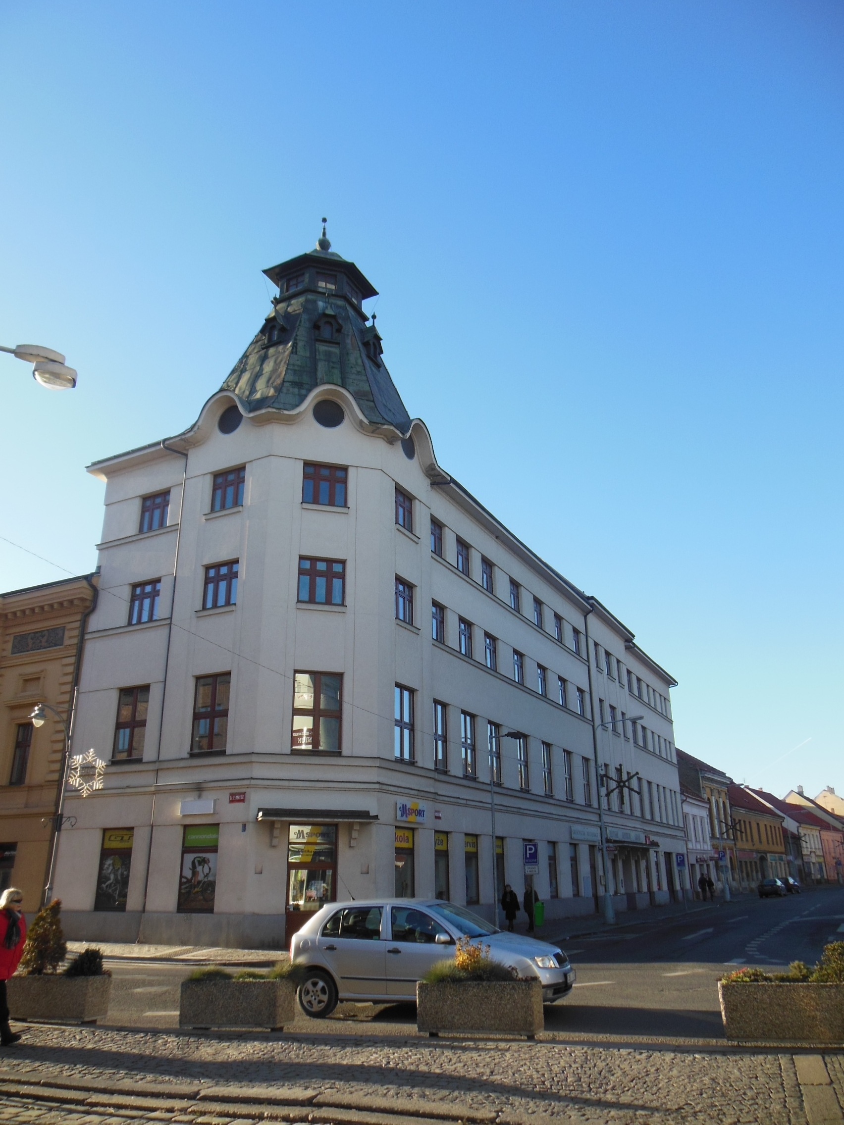 Dům č. p. 161 v ulici Třebízského ve Slaném (okres Kladno). Pohled z ulice Husova.